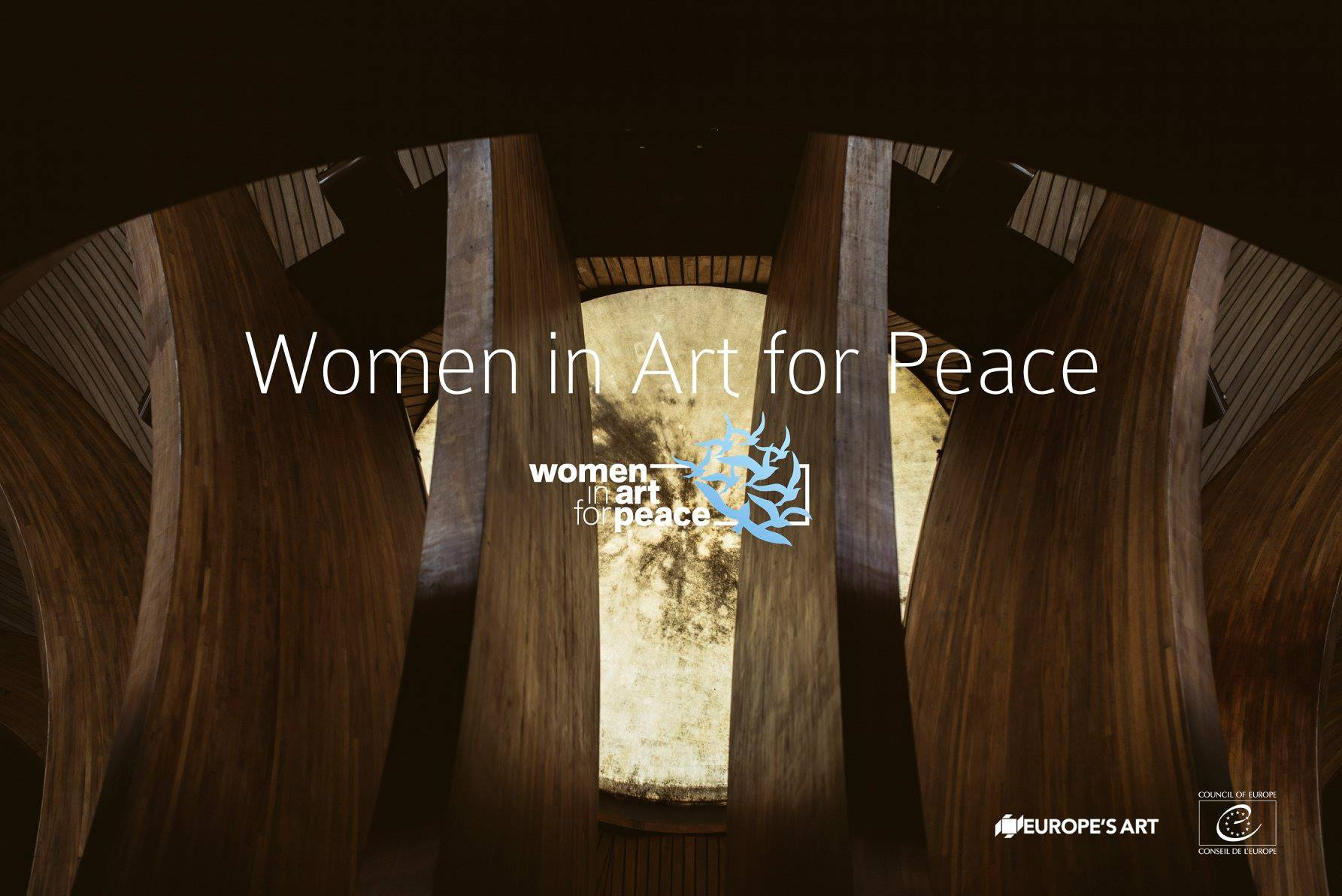 Women in Art for Peace Exhibition at the Council of Europe